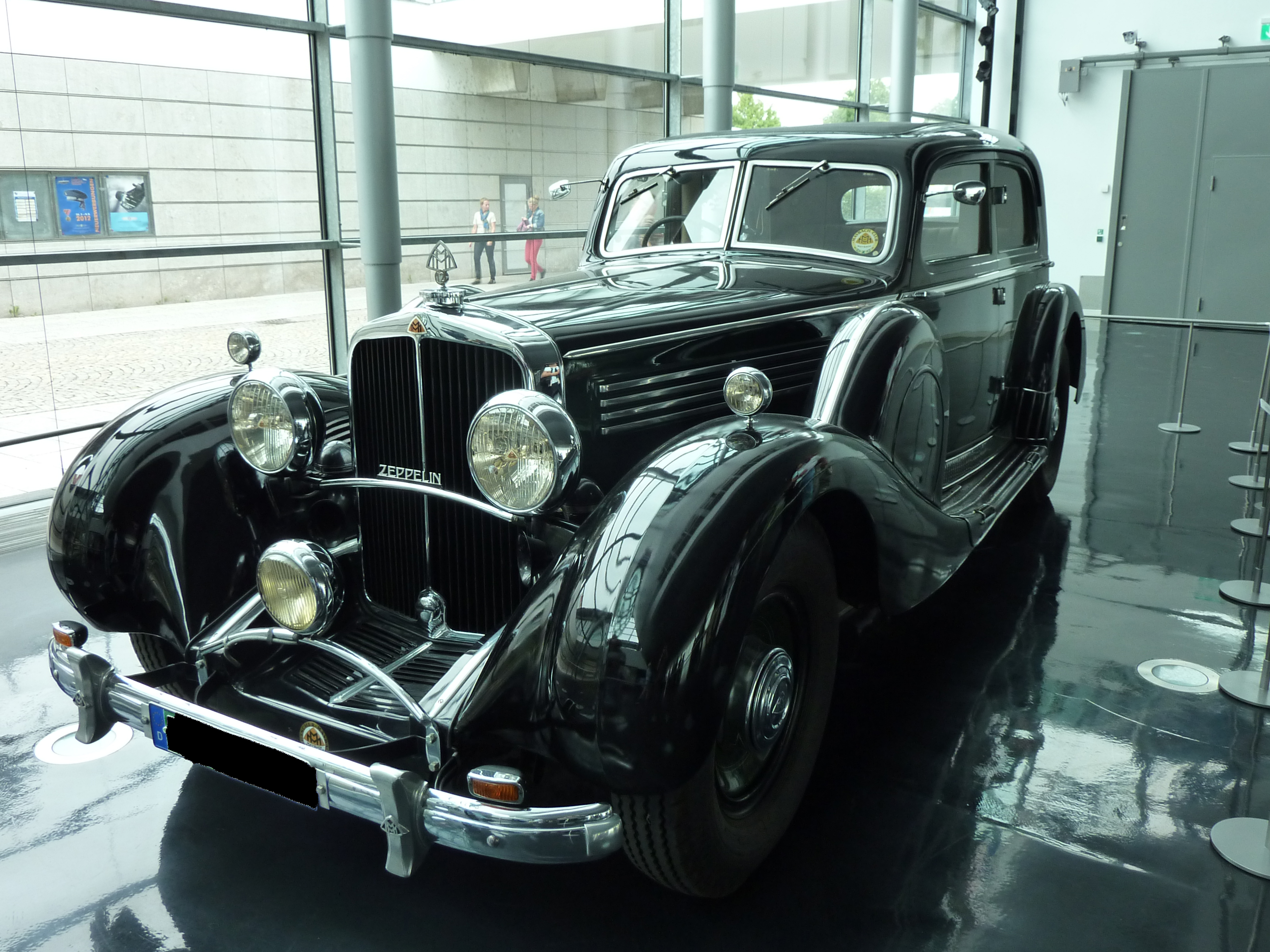 Maybach Zeppelin Baujahr 1928 12 Zylinder V-Motor; 7.922 ccm max. 170 km/h